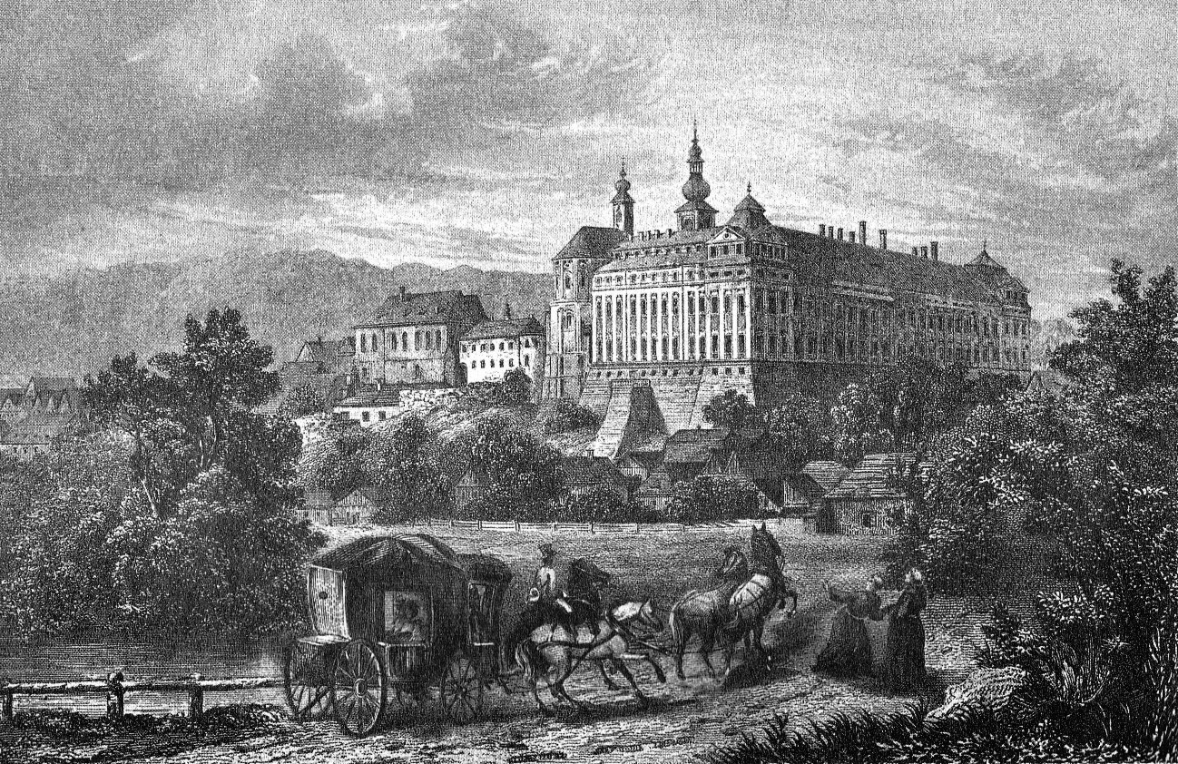 Historische Ansicht des Benediktinerklosters Braunau (heute Broumov/Tschechien). Stahlstich.